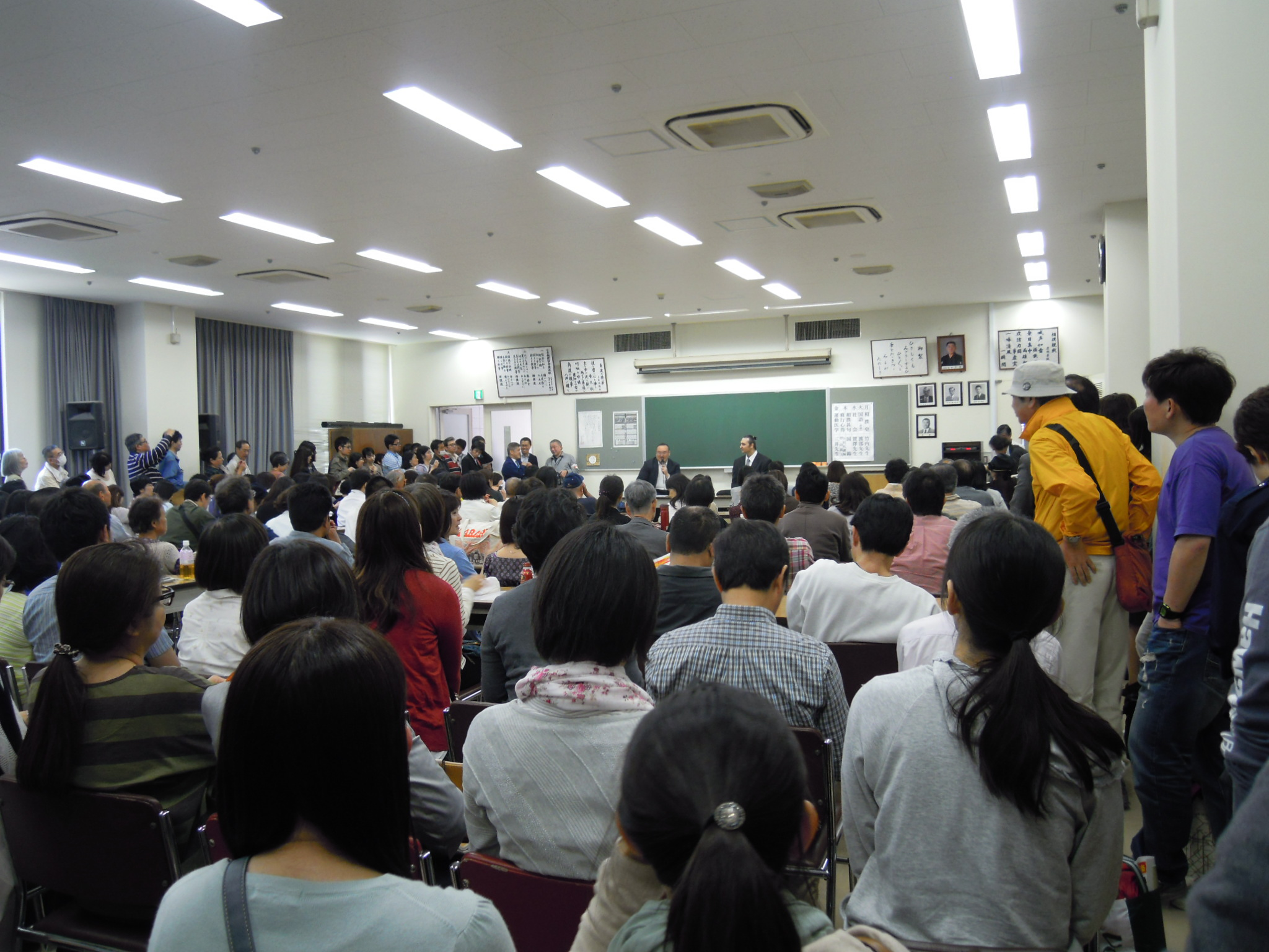 2014年5月10日に相撲教習所で開催された相撲塾の様子。中央左関ノ戸親方、右琴欧洲親方。